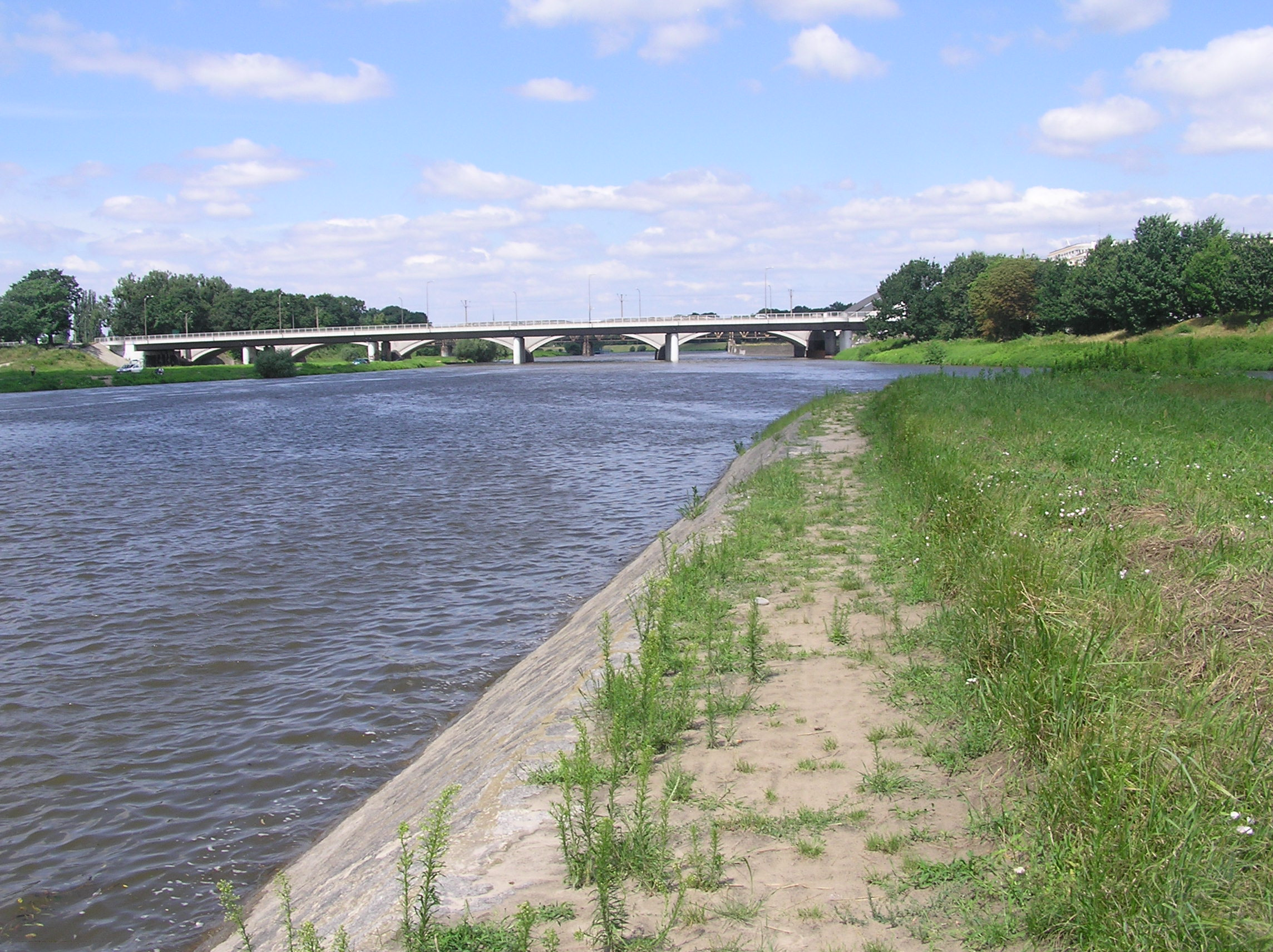 Ujście Kanału Powodziowego do Starej Odry, dalej Mosty Warszawskie